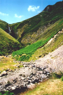 Eigen foto, augustus 2003